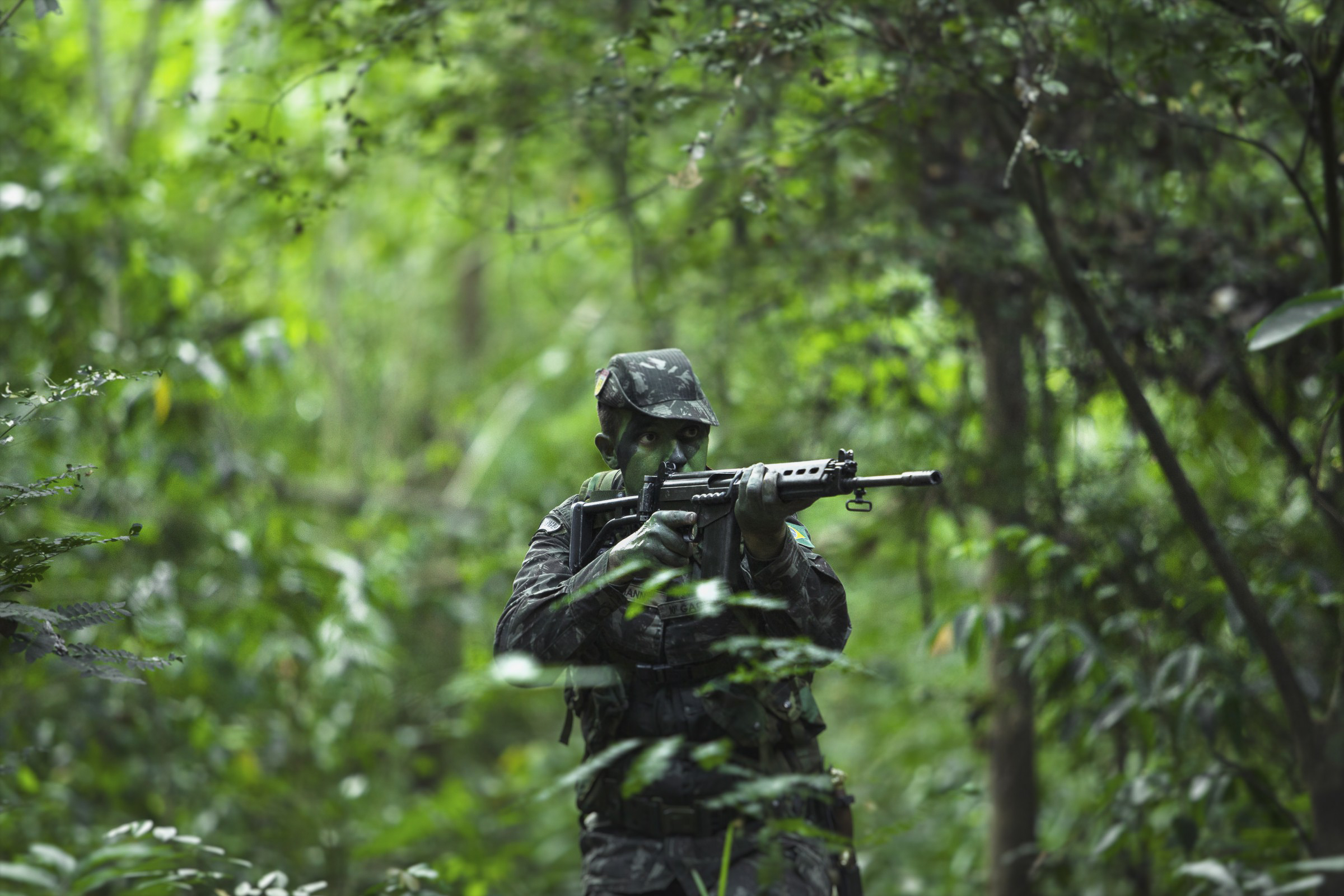 Foto: Cabo Filho/EB